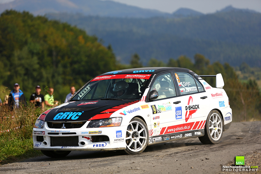 Rajd Wisły